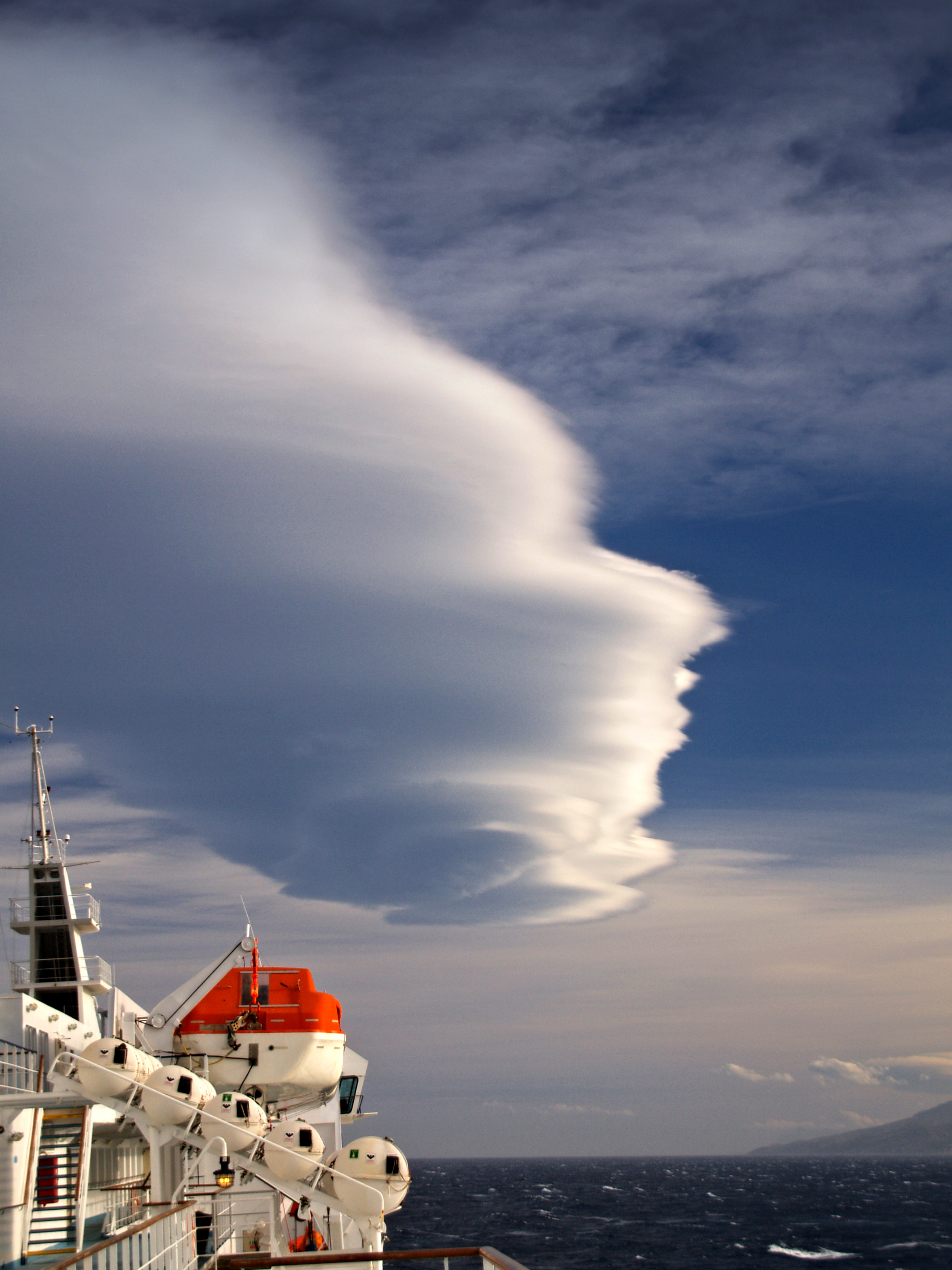 Bastia (Corse) - Lenticulaire formé par le libeccio au large de la ville